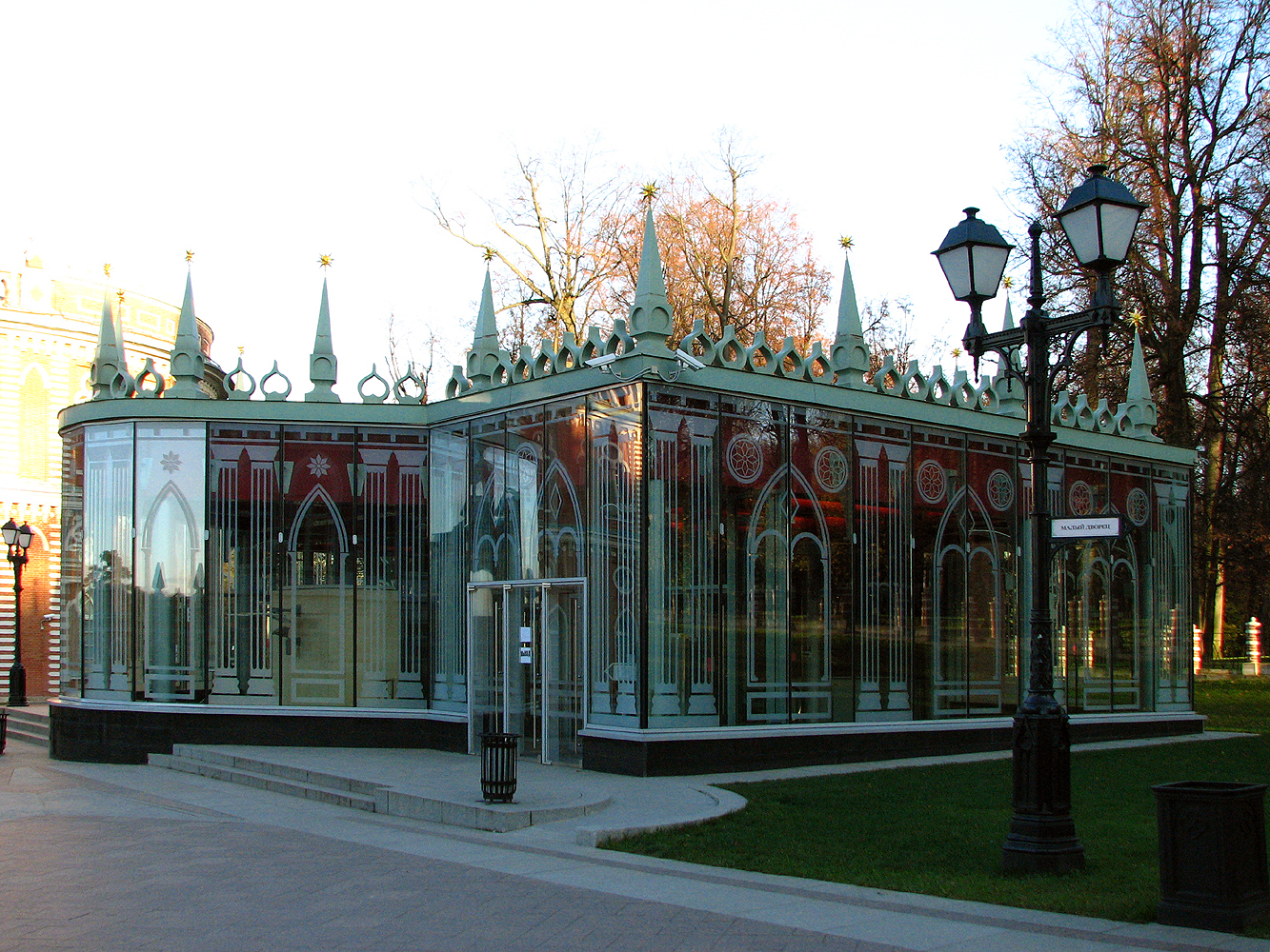 Павильон входа в музей, оформленный как Домик смотрителя, на месте которого построен